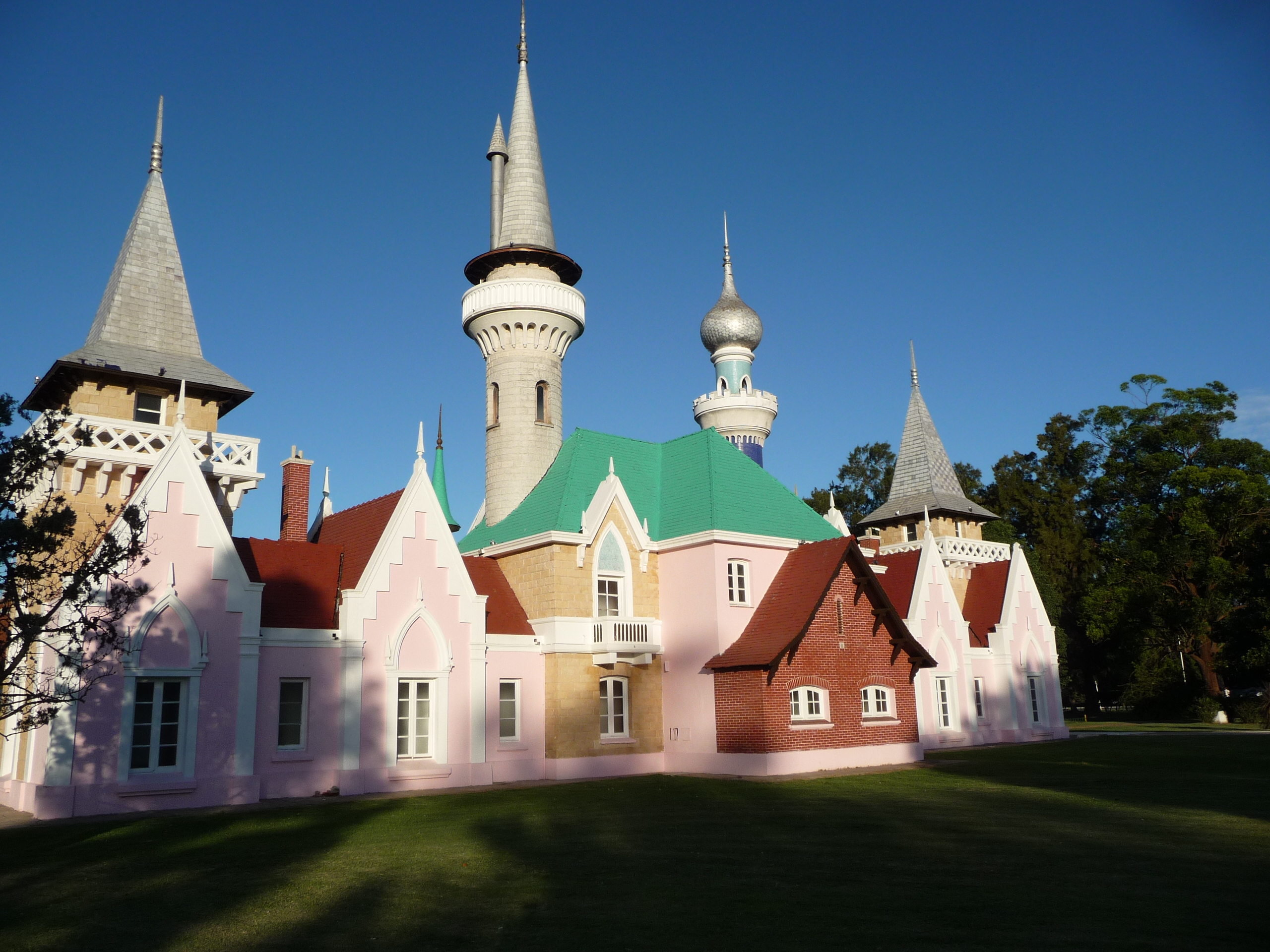 Edificios del Complejo Recreativo de la República de los Niños